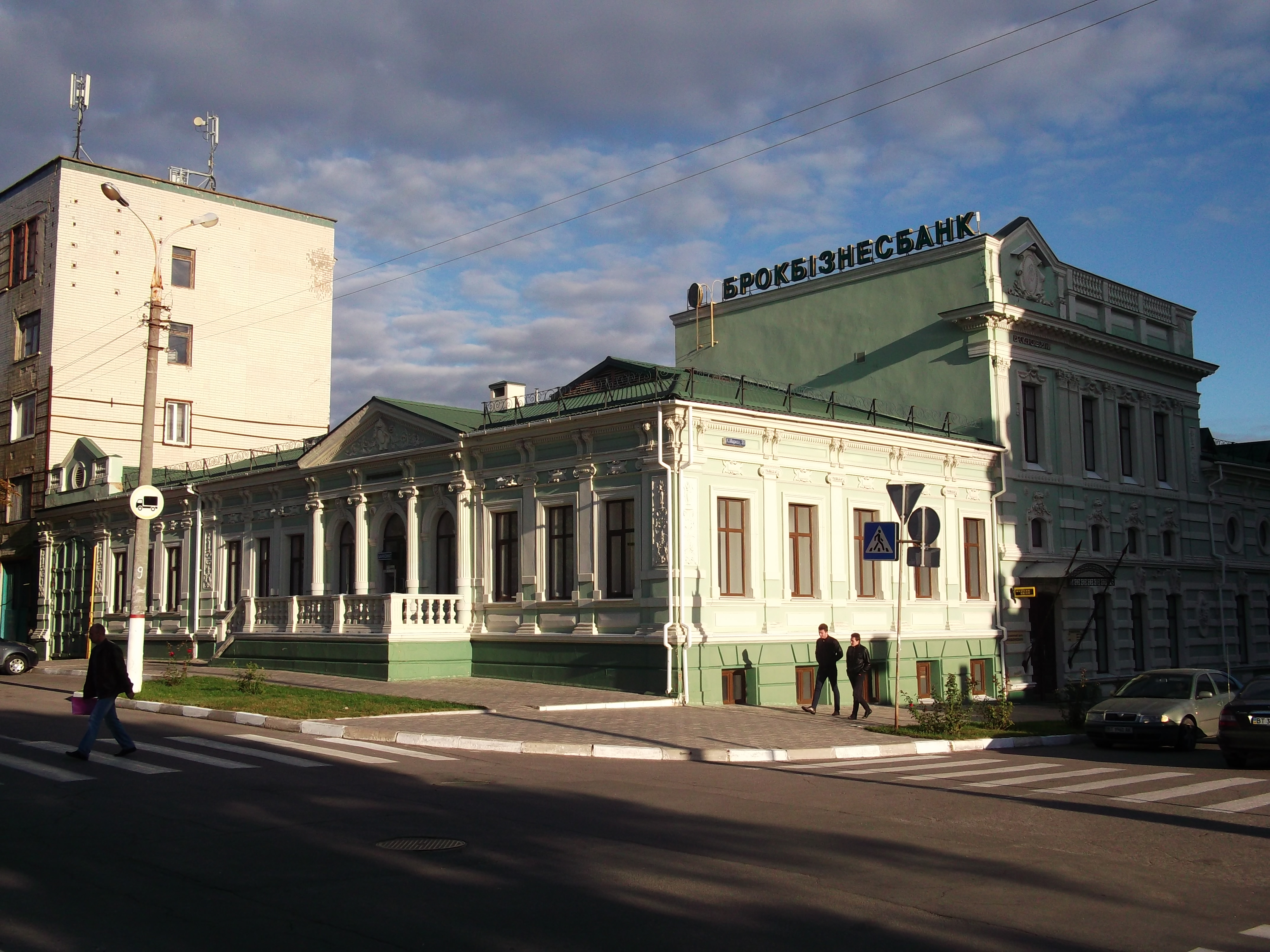 Житловий будинок Лобрі, губернська гімназія, Херсон, Карла Маркса вул., 20